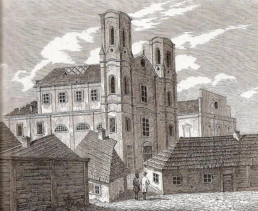 чорнобіла літографія із зображення костьола оо. Єзуїтів у Житомирі.